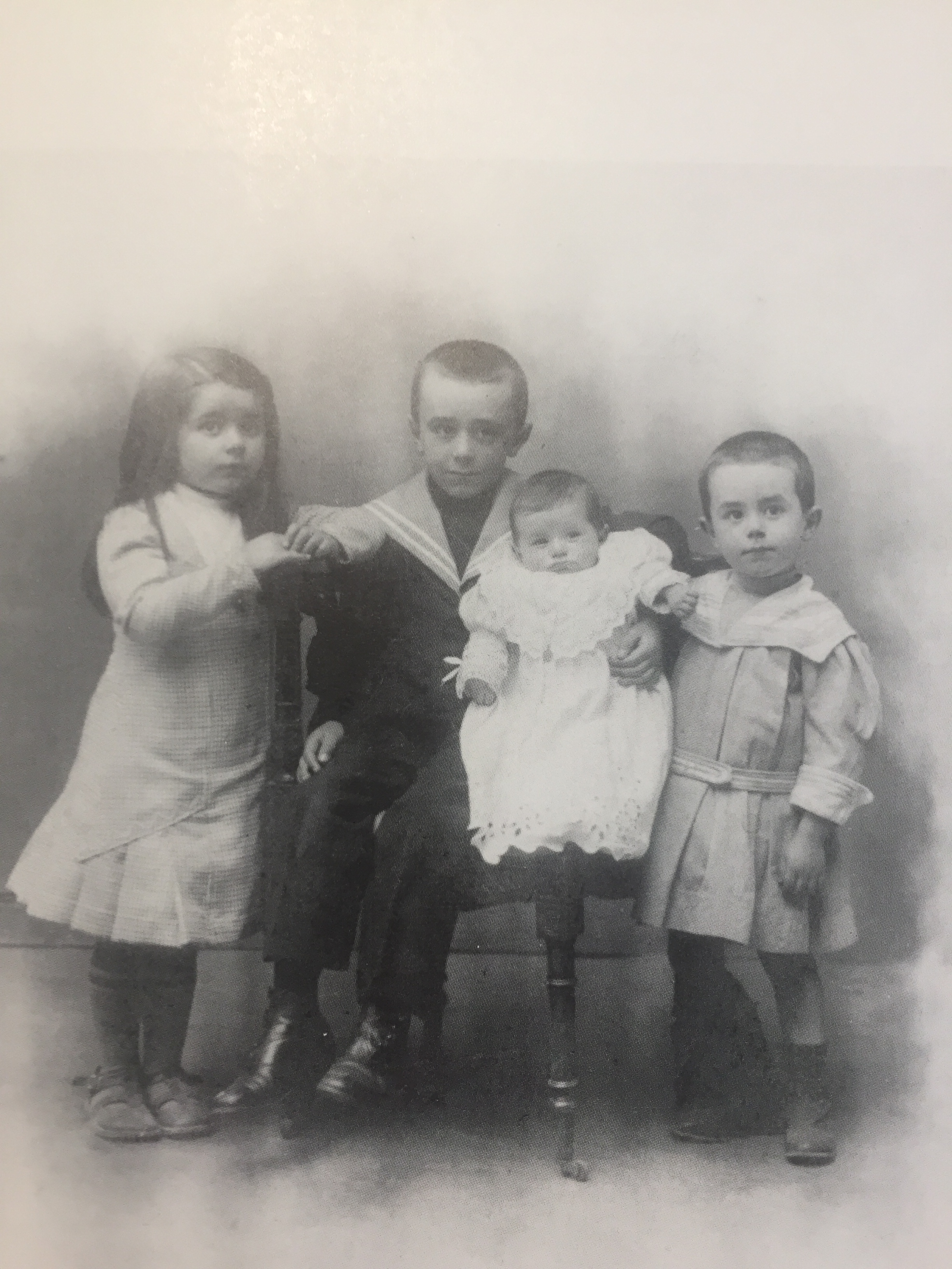 Al centro vestito alla marinara, Pasquale Morino all'età di 6 anni con le sorelle ed il fratello.